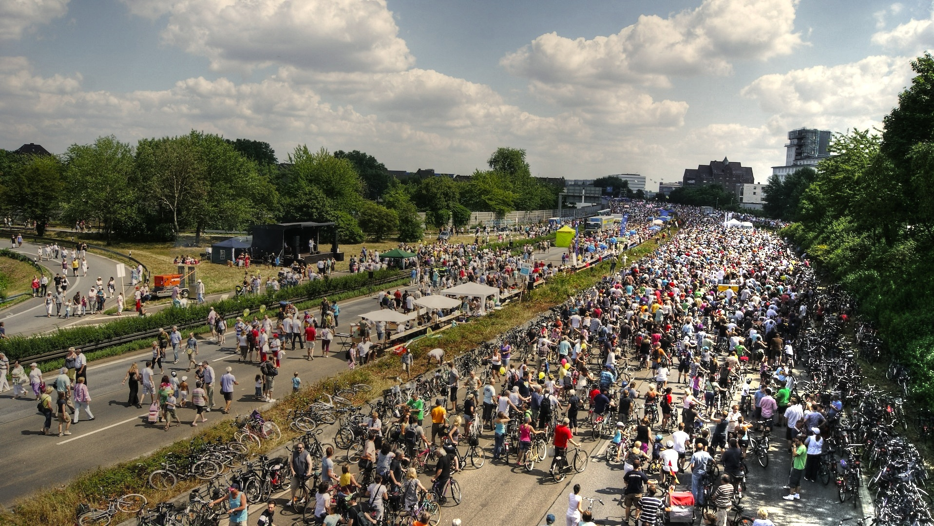 A40 - Stillleben in Duisburg (RUHR.2010)